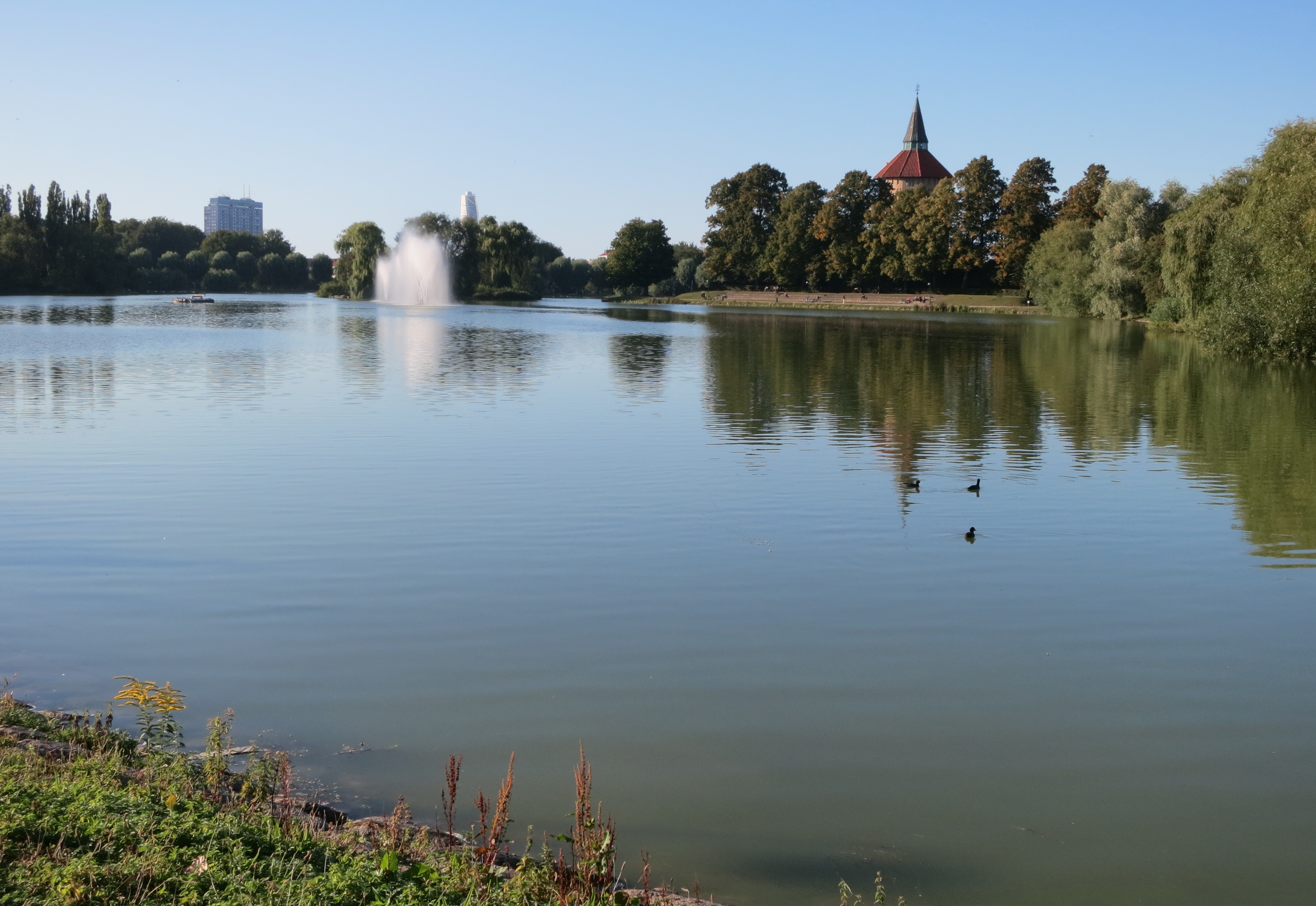 Pildammarna, Malmö